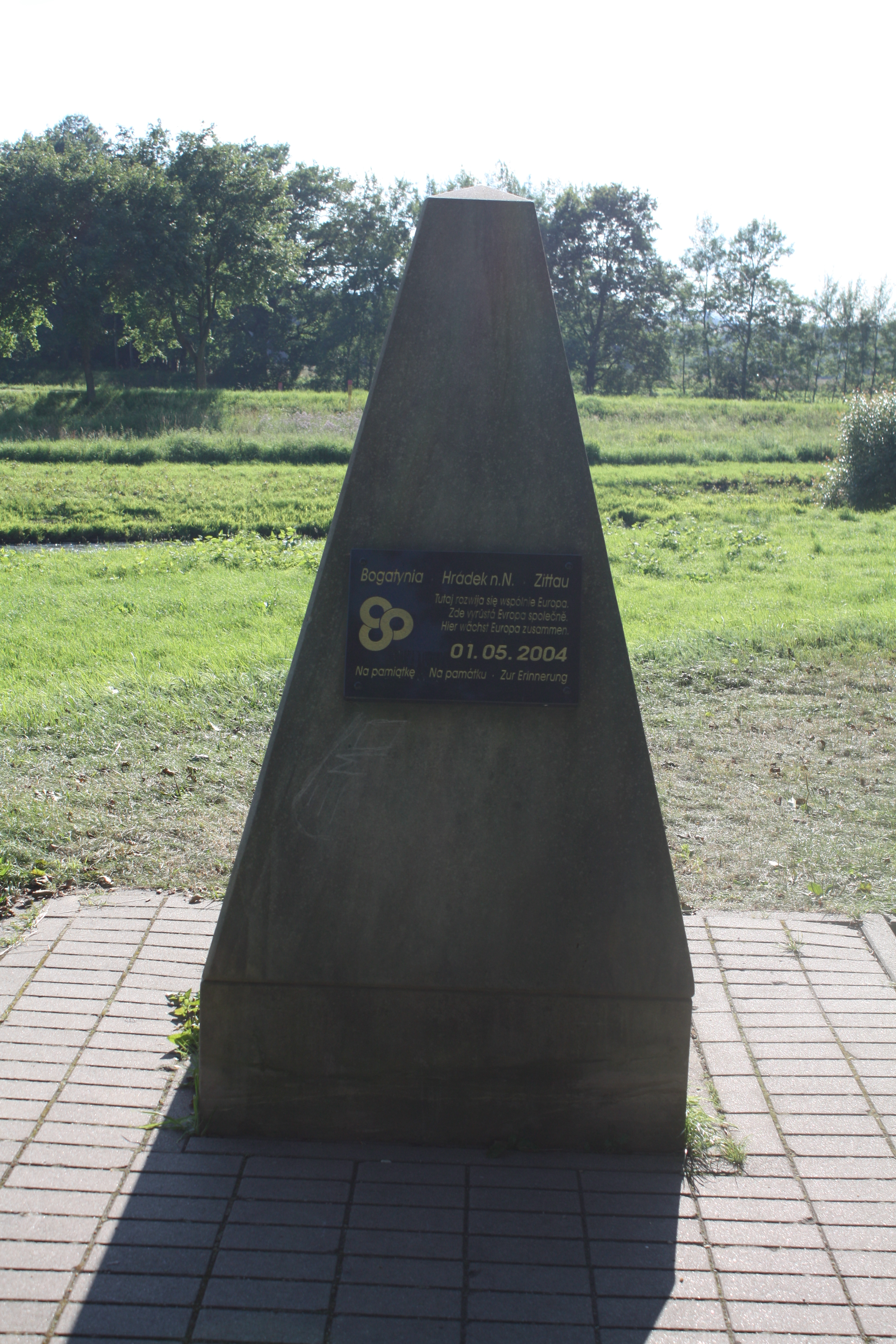 This photo of Lower Silesian Voivodeship was taken during Wikiexpedition 2013 set up by Wikimedia Polska Association. You can see all photographs in category Wikiekspedycja 2013. Permission=Ludwig Schneider put it under GFDL and Creative Commons Attribution ShareAlike 3.0,2.5,2.0,1.0 and cc-by-sa-4.0 - self